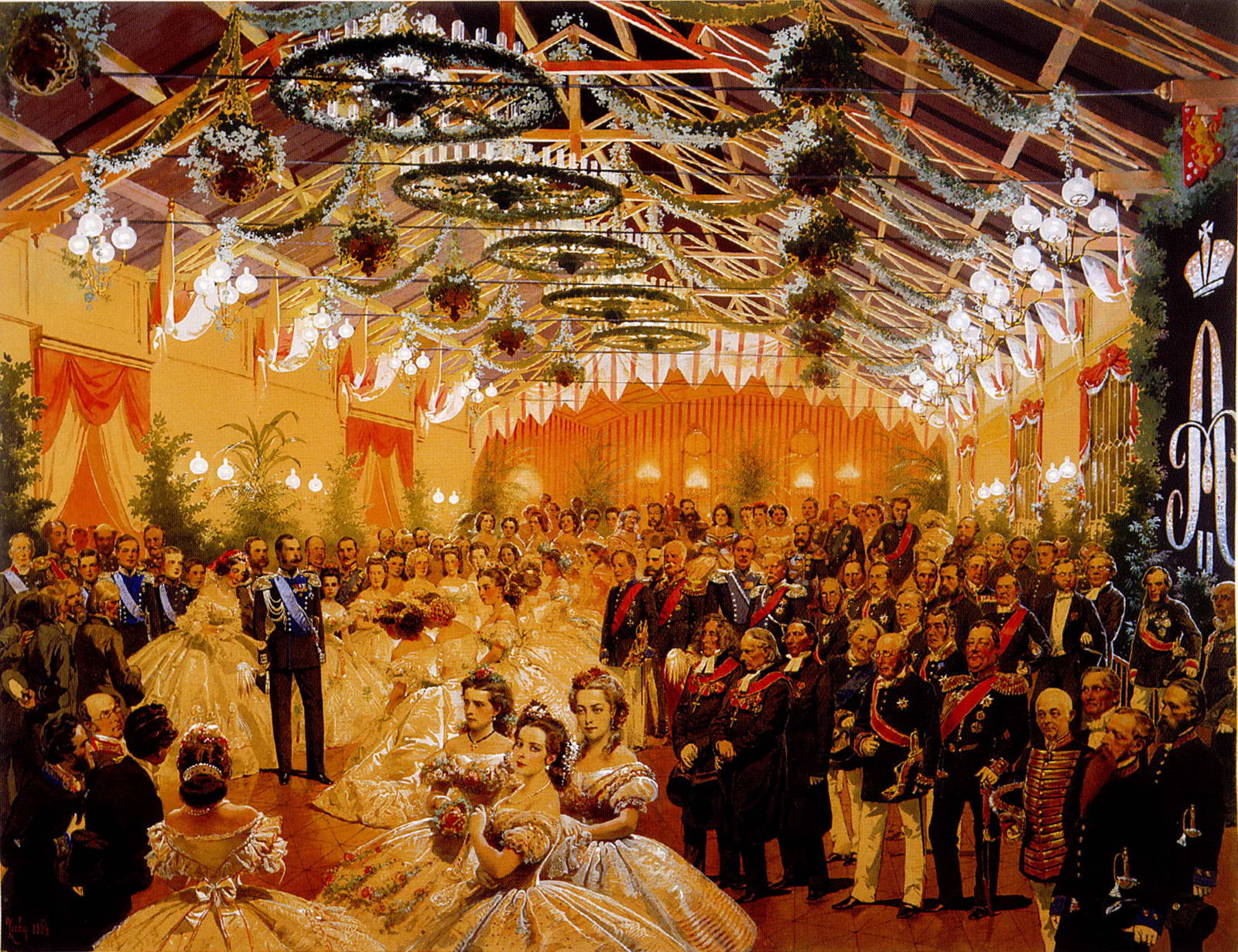 Бал в честь императора Александра II, организованный городом Гельсингфорсом в сентябре 1863 г. в здании железнодорожного вокзала. 1864 Внизу слева подпись и дата: Zichy 1864 Внизу на паспарту надпись (авторская?): Bal offert a Sa Majeste I’Empereur par la ville Helsingfors к Sept. 1863 (dans la gare de chemin du fer) Акварель, гуашь, белила, следы карандашного наброска. 450 х 610 Происхождение: пост, в 1927 из Библиотеки Зимнего дворца Инв. № ОР-27380 Выставки: 1977-1978 Budapest Литература: Алешина 1975, с. 199 Событие, зафиксированное Зичи, связано с политикой Александра II по отношению к Великому княжеству Финляндии, входившему в состав Российской империи. 3-5 сентября по инициативе императора в Гельсингфорсе был созван сейм (не собиравшийся с 1809 г.), где Александр II произнес многообещающую речь с предложением расширить права местного представительства, закрепив их в соответствующем законе, который предстояло выработать в ближайшие годы. Акварель исполнена по натурному карандашному наброску, как можно судить и по более поздней дате на рисунке, и по его плотной красочной фактуре. Александр II изображен в мундире лейб-гвардии Финского стрелкового батальона рядом с императрицей Марией Александровной и в окружении офицеров в той же форме. Справа финские депутаты.